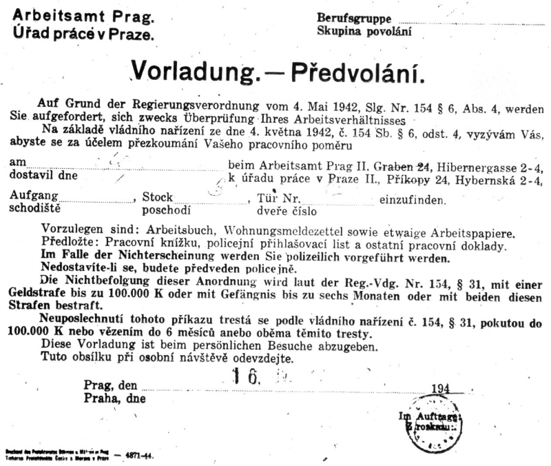 Protektorát Čechy a Morava - předvolání na obávaný "pracák." Odtud vedla cesta většinou na totální nasazení ve Třetí Říši